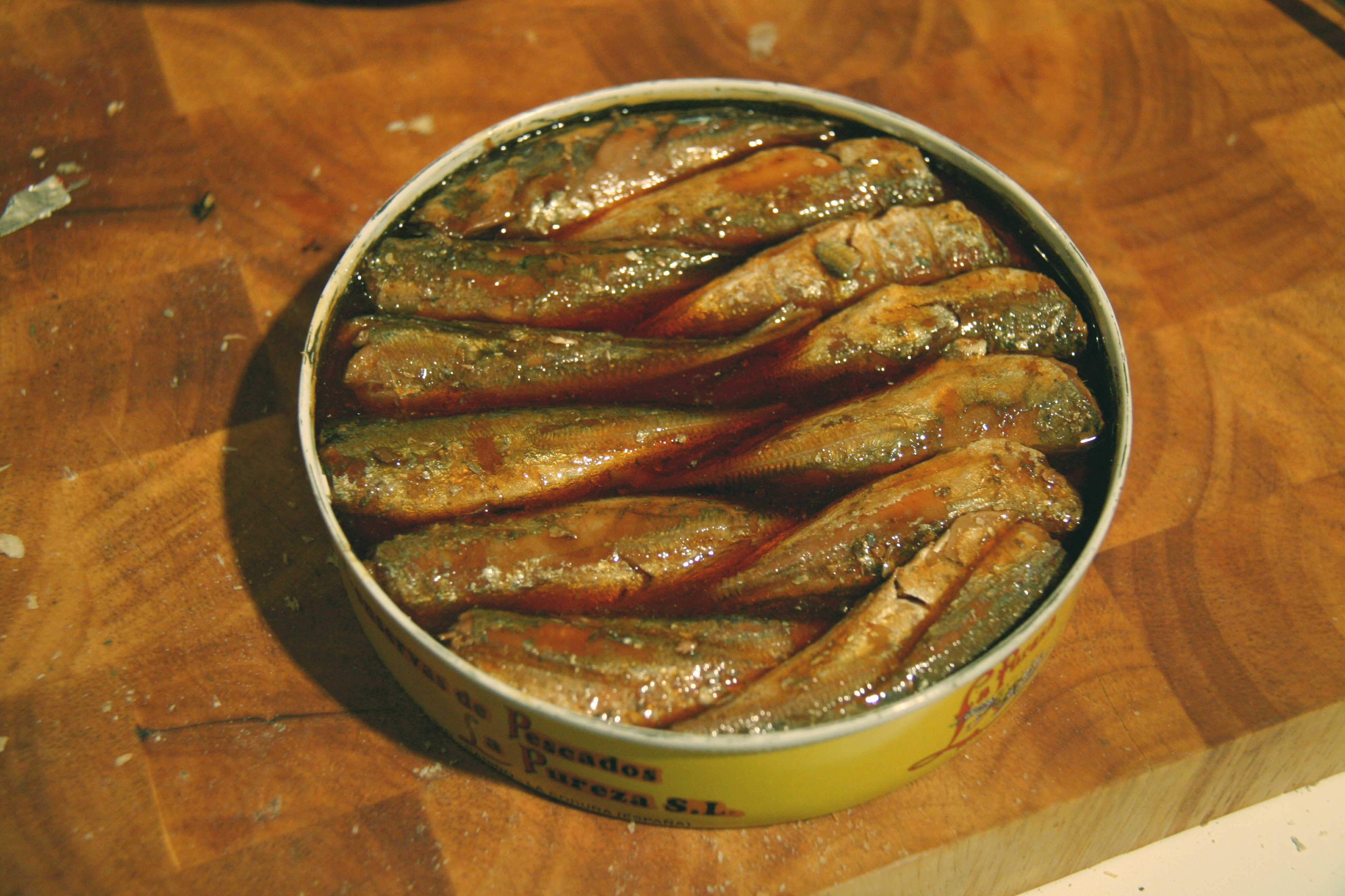 Chicharros en escabeche